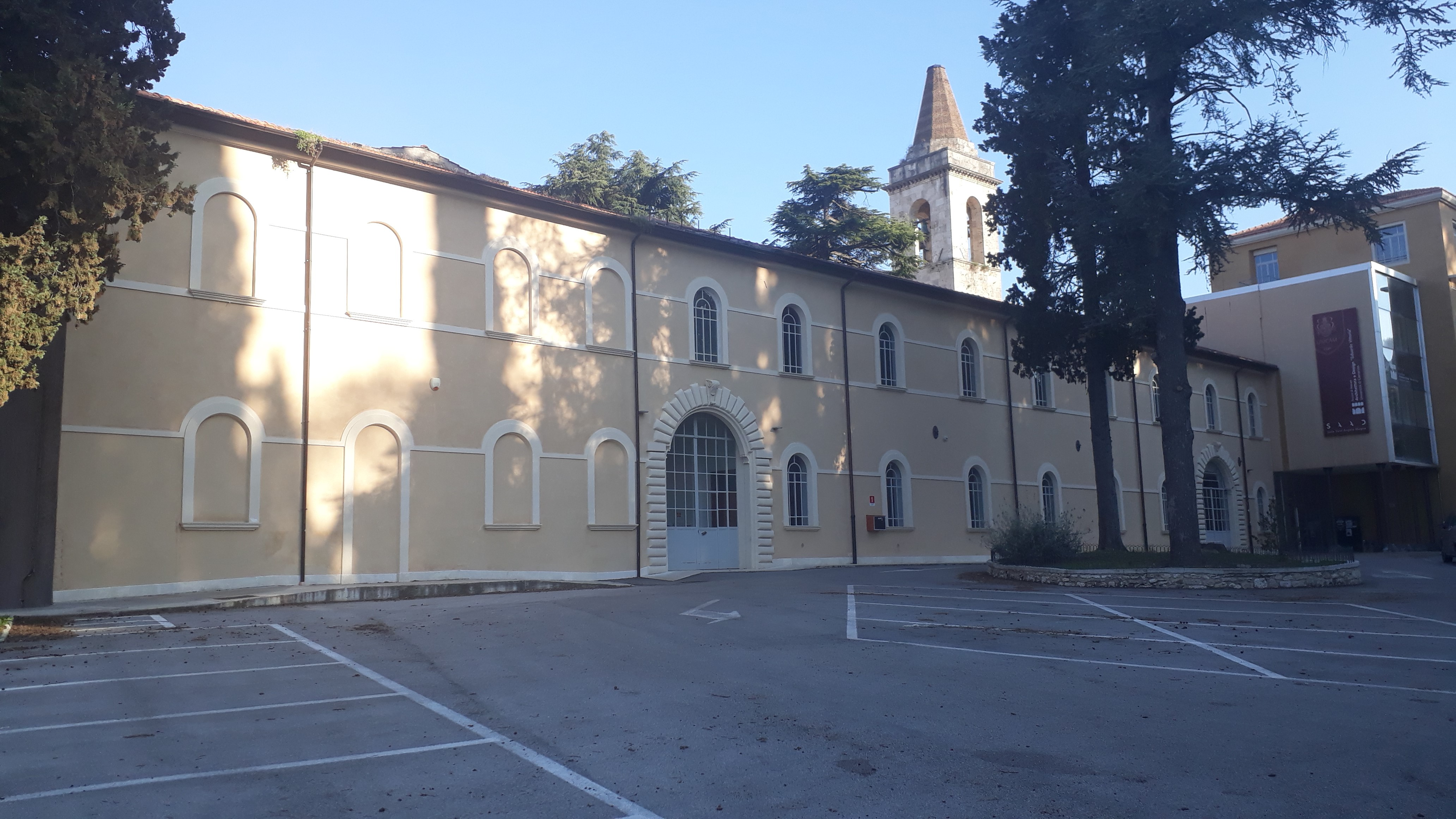 La sede "Sant'Angelo Magno" della Scuola di Ateneo Architettura e Design "Eduardo Vittoria".